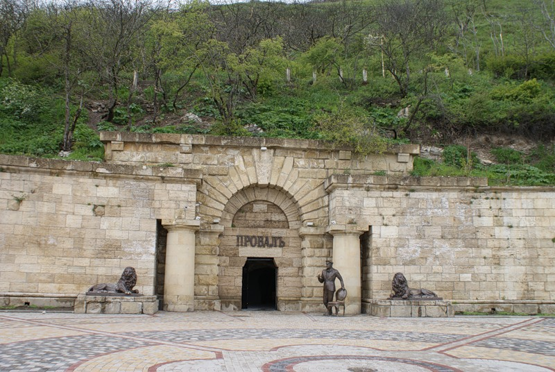 Памятник природы в городе-курорте Пятигорск - озеро Провалъ. Вход в Провалъ с площадкой перед ним и памятником Великому комбинатору Остапу Бендеру.